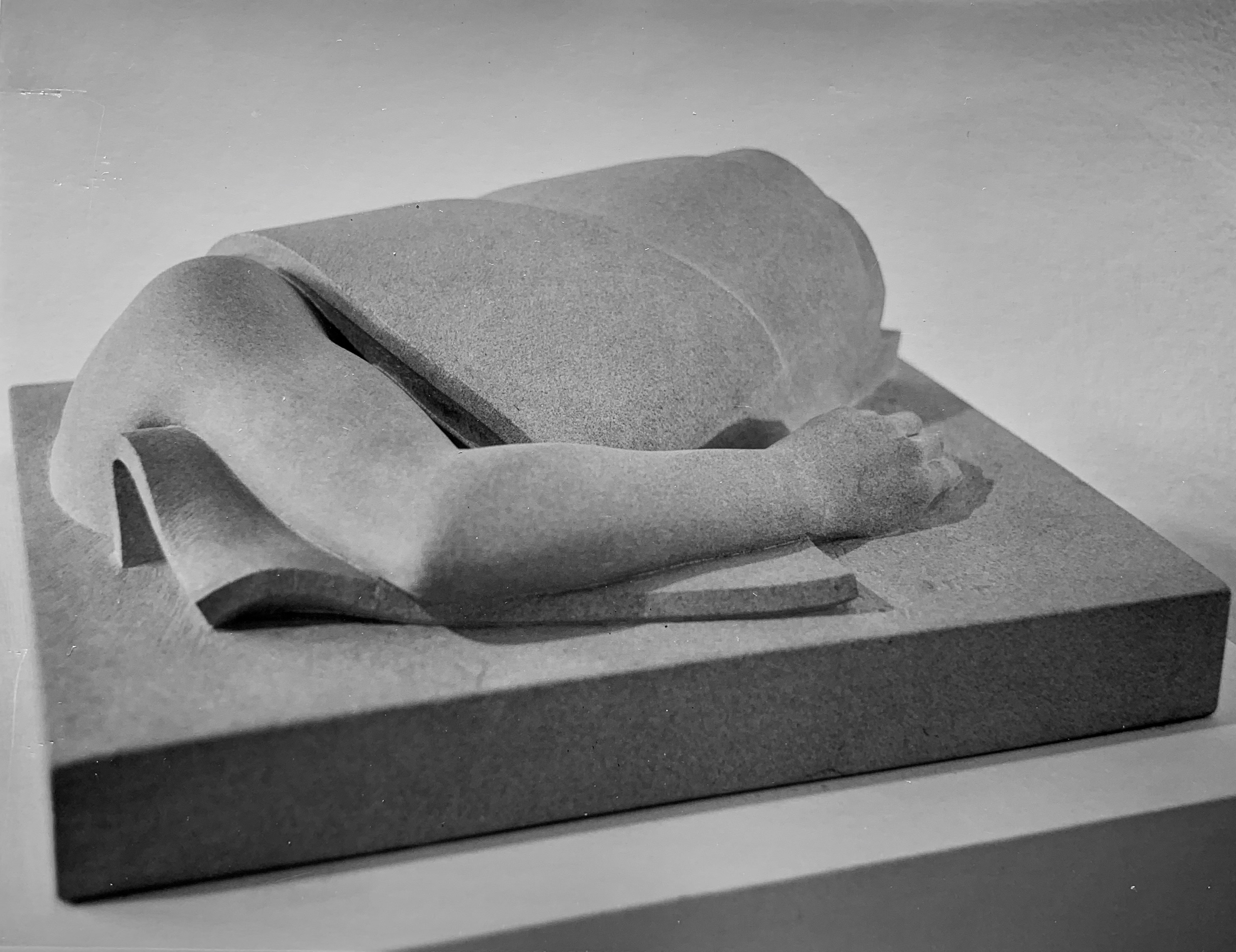 Flucht - Sandstein, 64cm, 1981